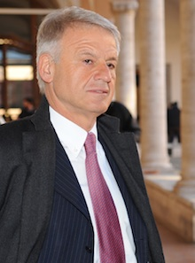 Il ministro Corrado Clini